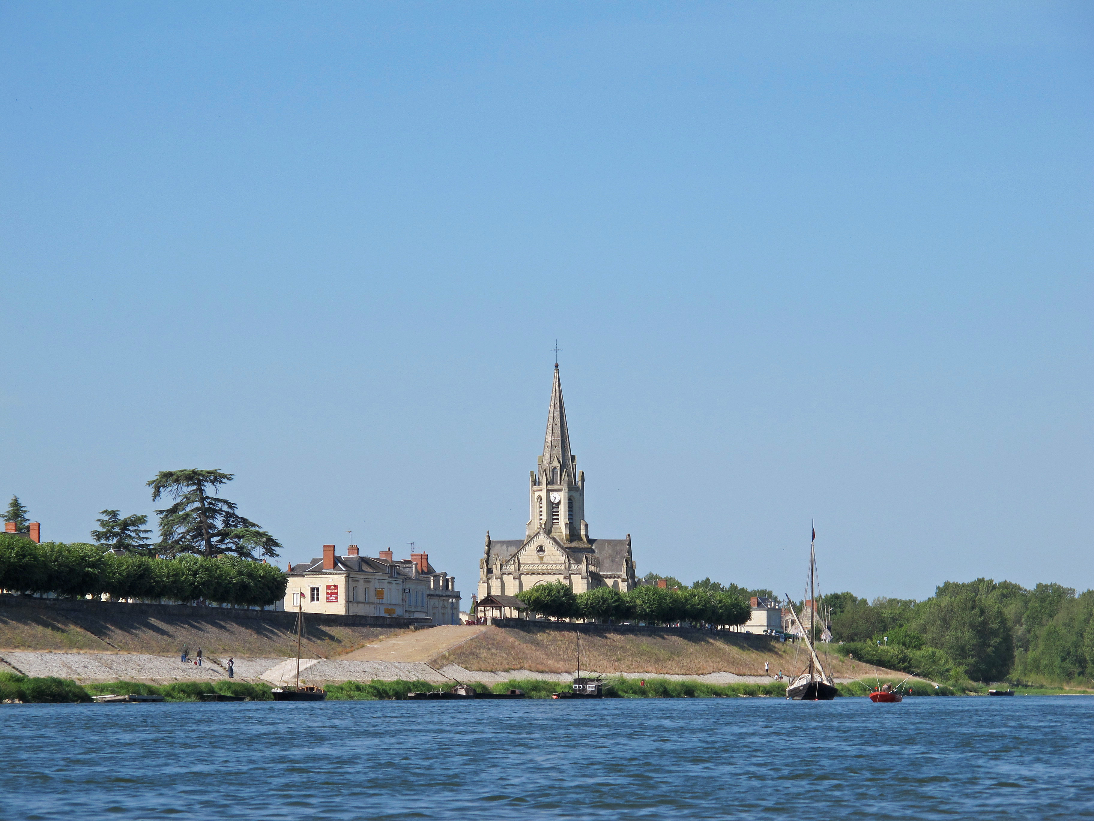 L'église, et le port pavé avec deux rampes d'accès. La présence du bateau du dernier pêcheur professionnel rappelle la pêche au saumon ou à l'alose, anciennement pratiquée. The church and the harbor with two paved ramps. The presence of the vessel reminded of the last commercial fisherman fishing for salmon or shad, formerly practiced.